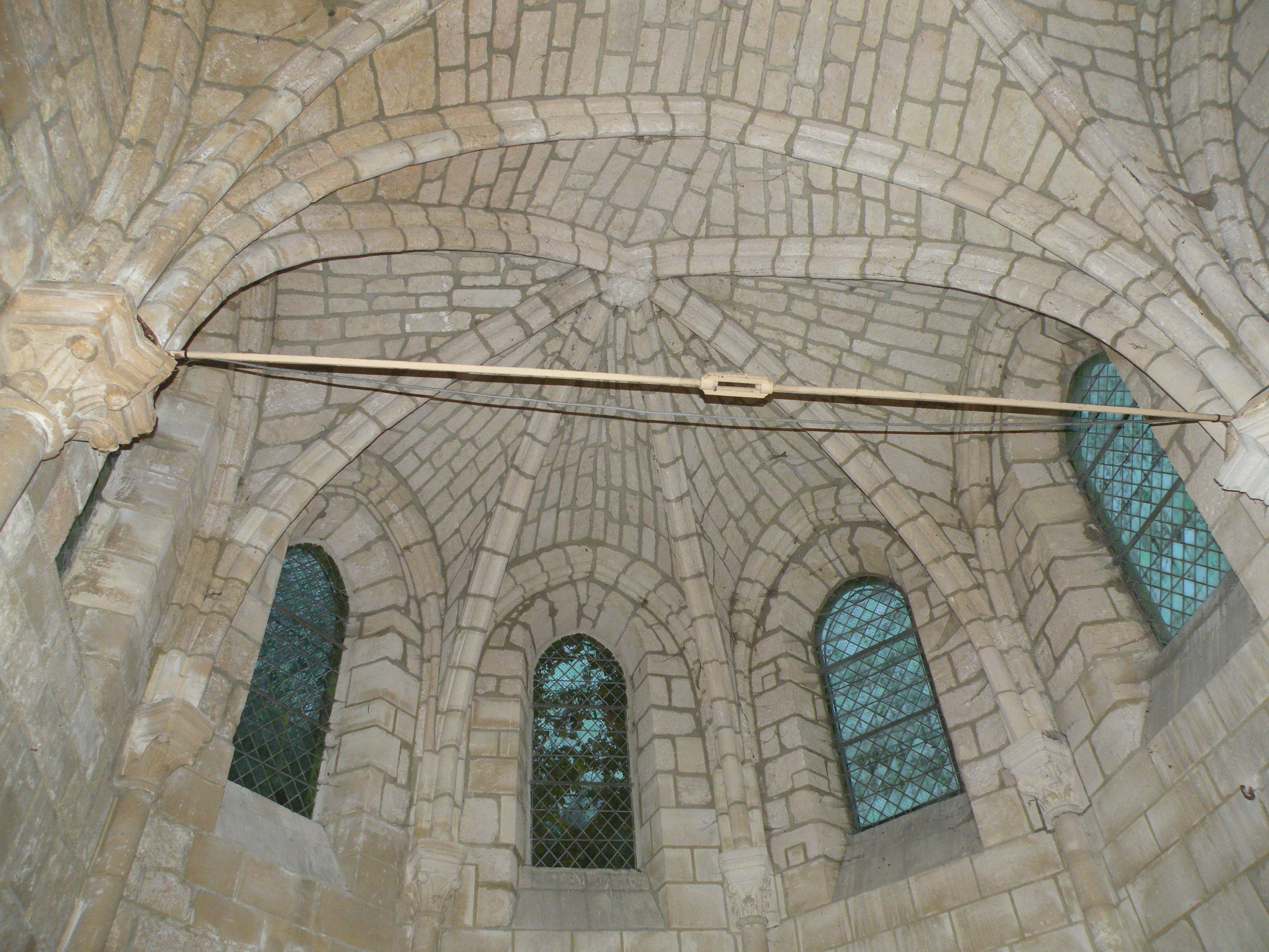 Intérieur de l'église Saint-Martin de Frouville